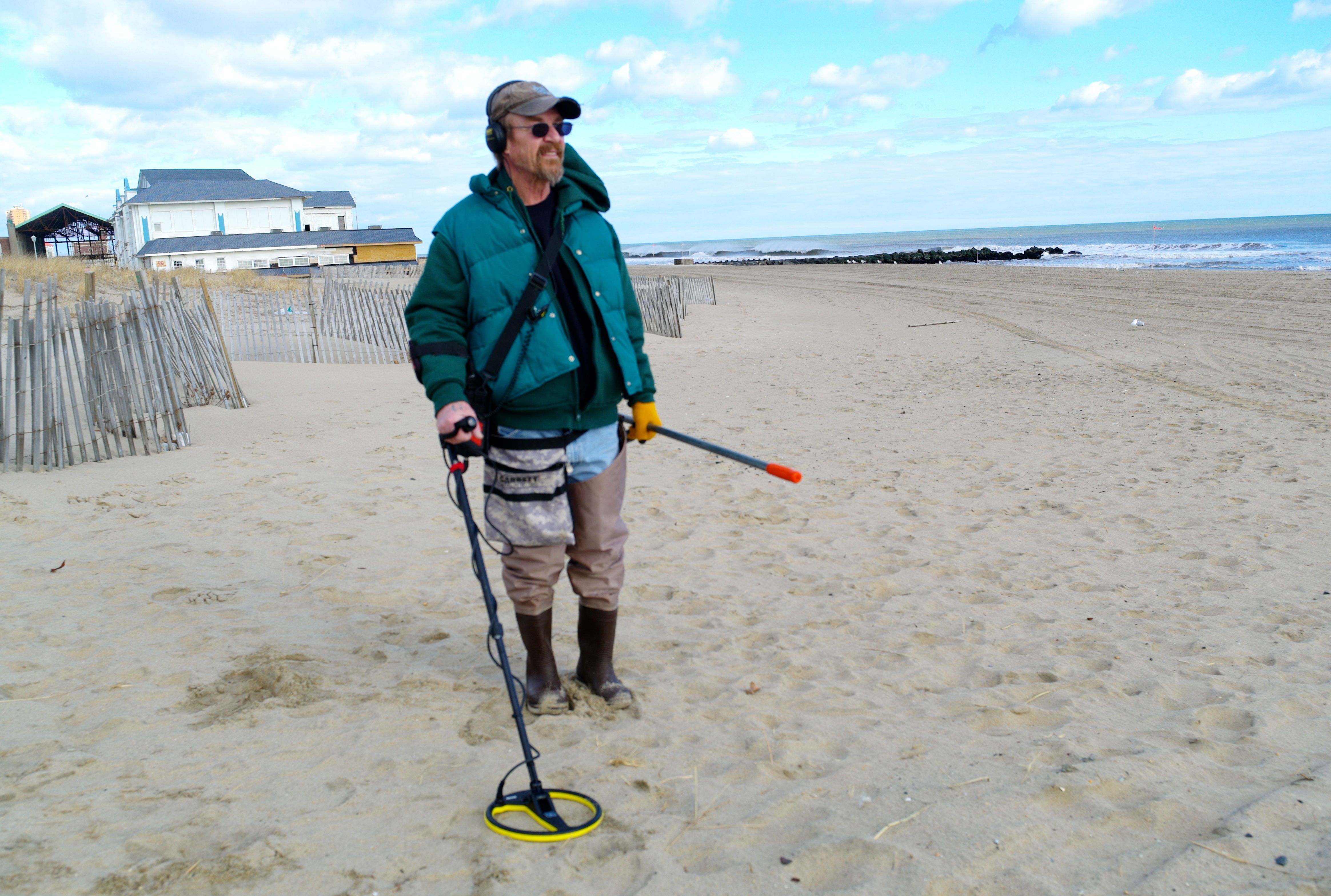 metal detecting beach